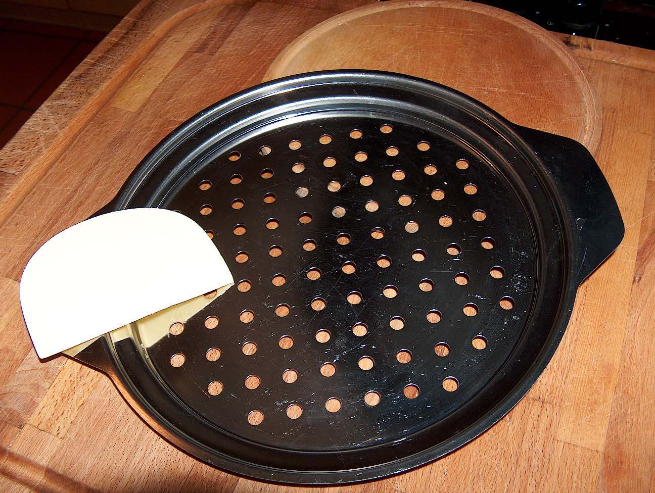 Ein Spätzlesieb mit Teigkarte zur Herstellung von Spätzle